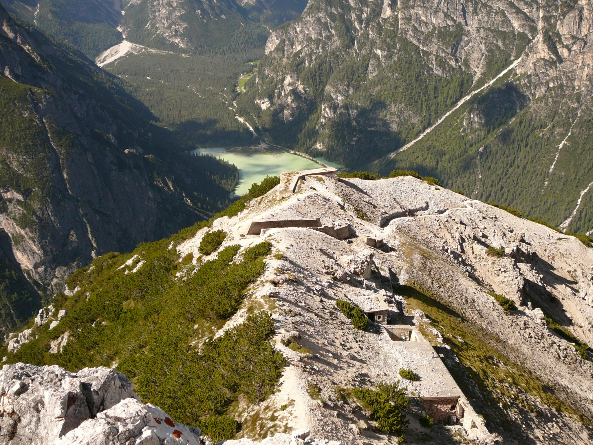 Monte Rudo, prima caserma